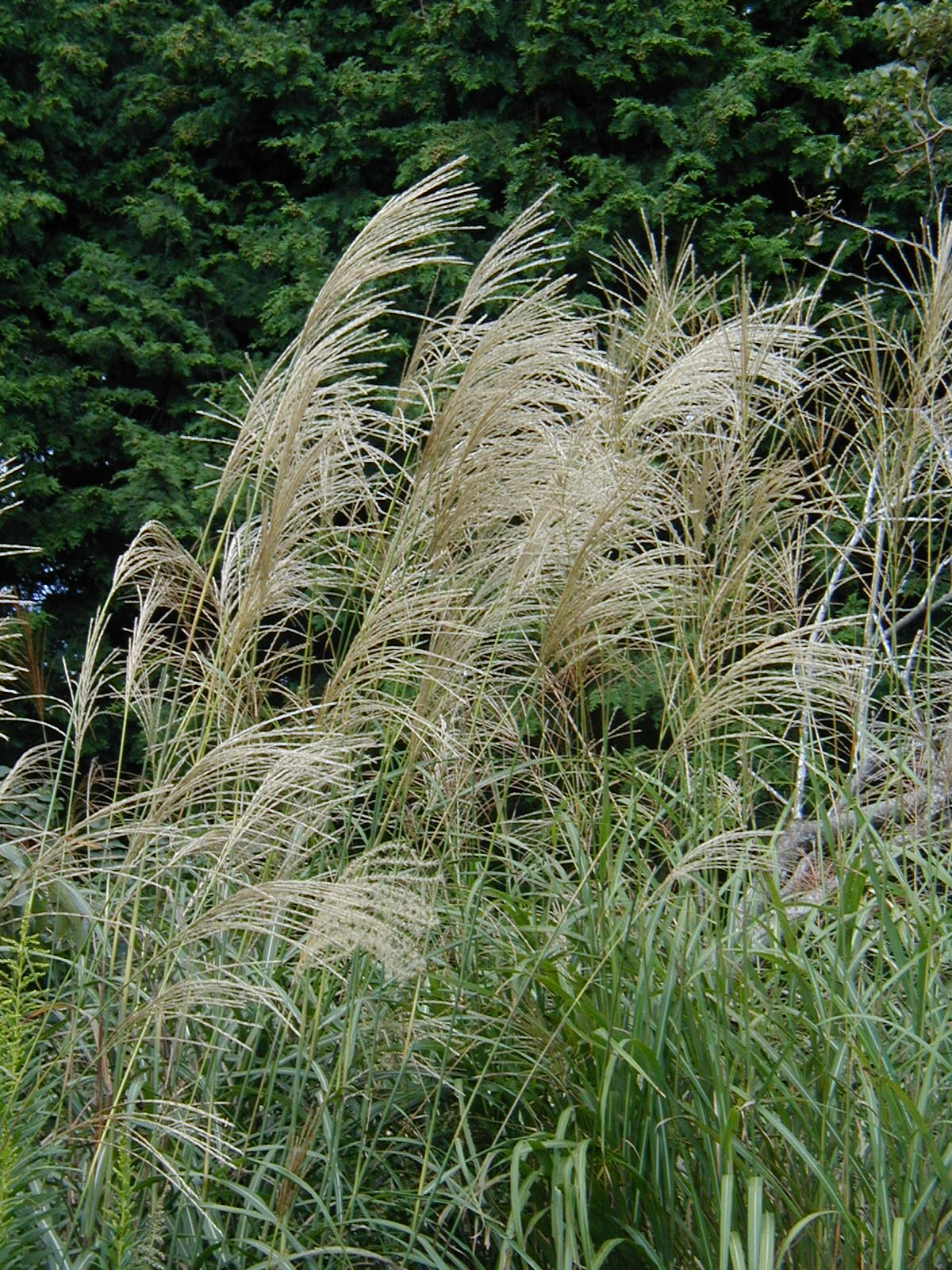 Miscanthus sinensis (ススキ)